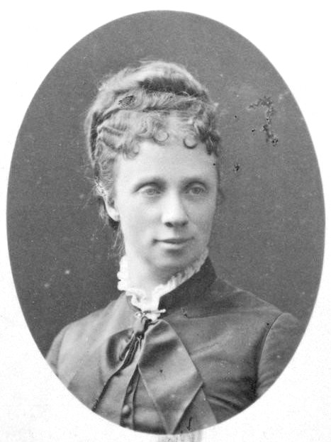 Duchesse Marguerita de Madrid (1847-1893).